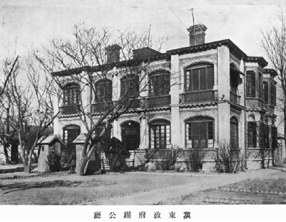 冀东防共自治政府位于通州的民政厅、财政厅、建设厅办公大楼远景照片